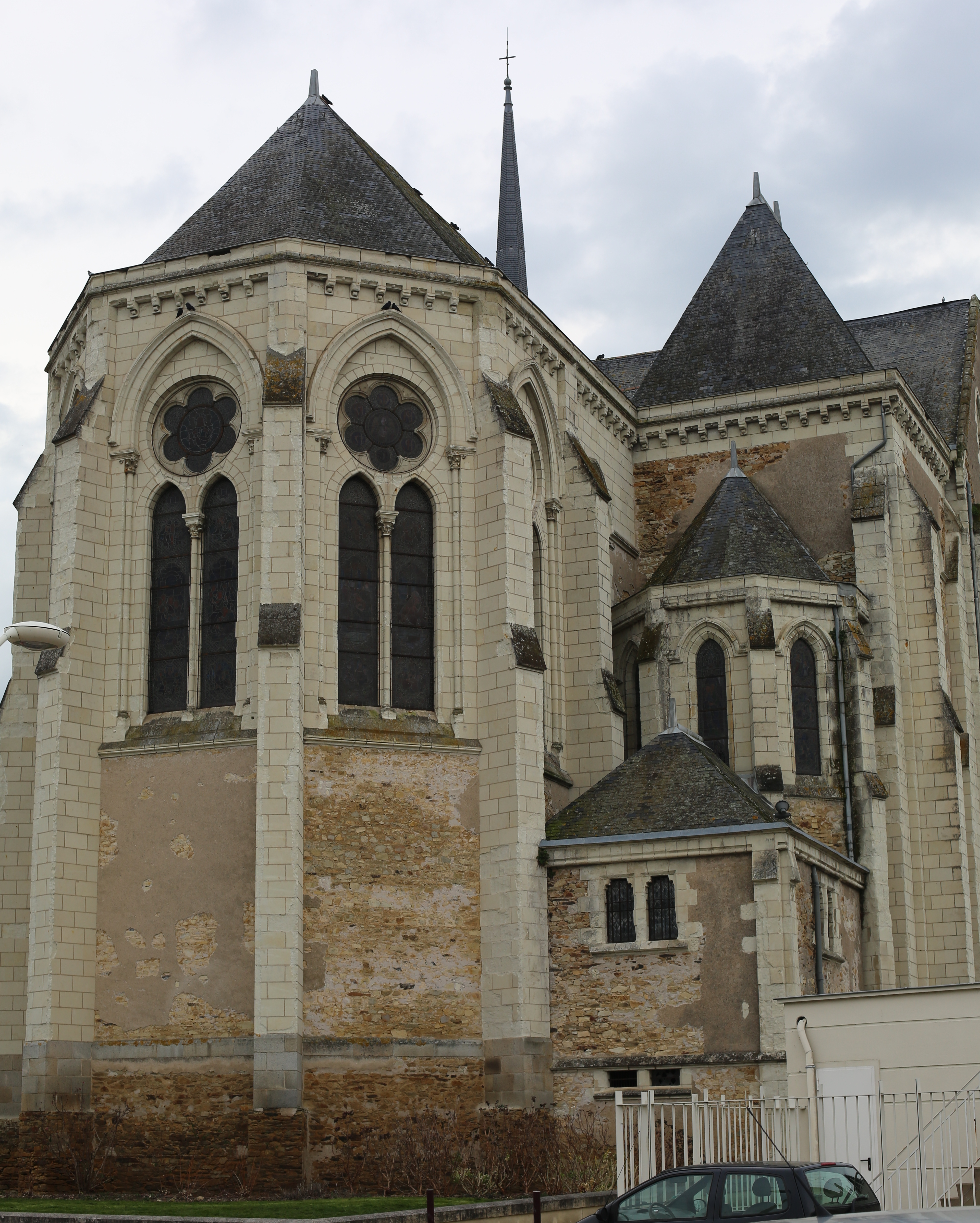 Église Saint-Martin du Lion-d'Angers.